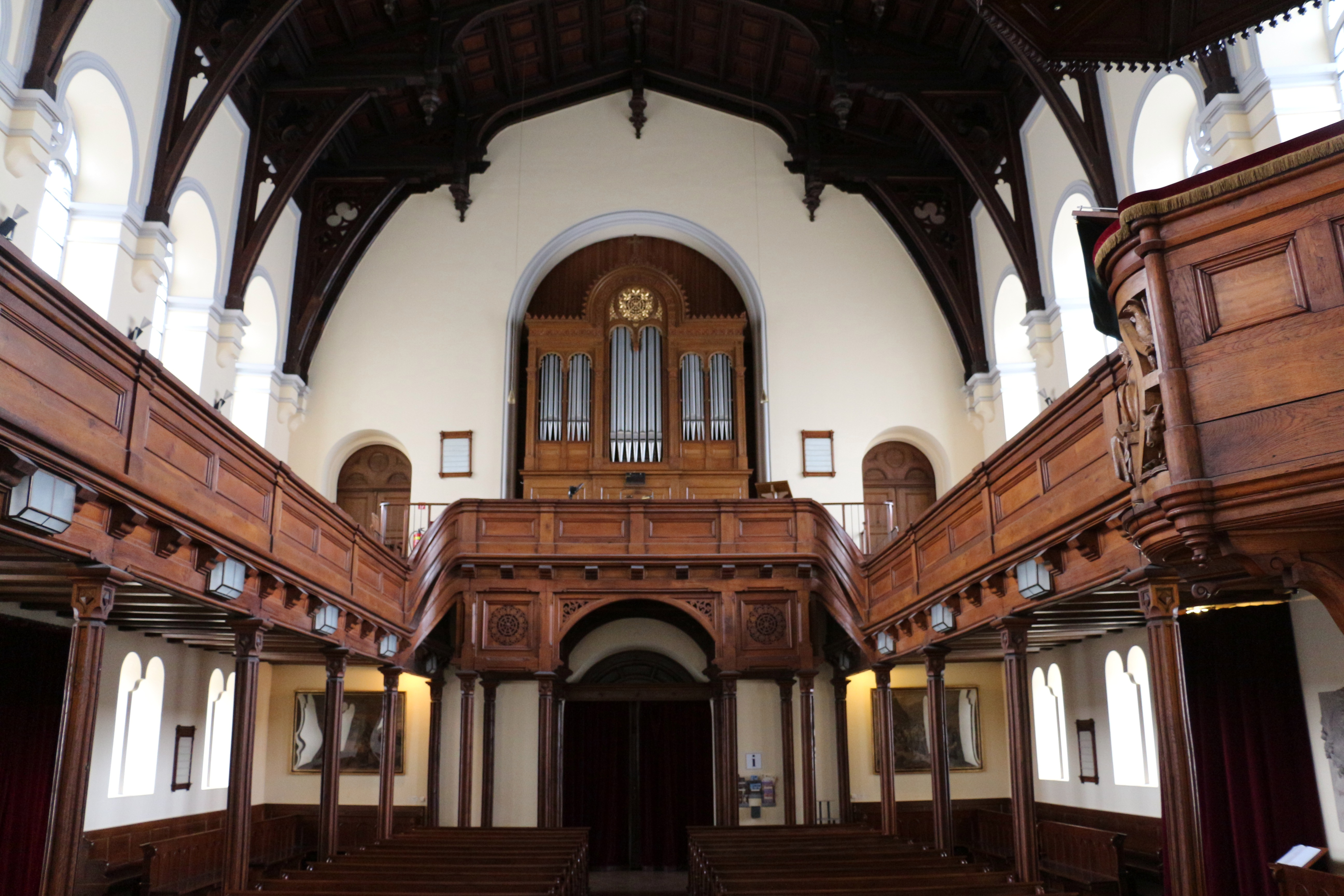 Evangelische Christuskirche, Salzburg, Schwarzstraße; Blick vom Altar.